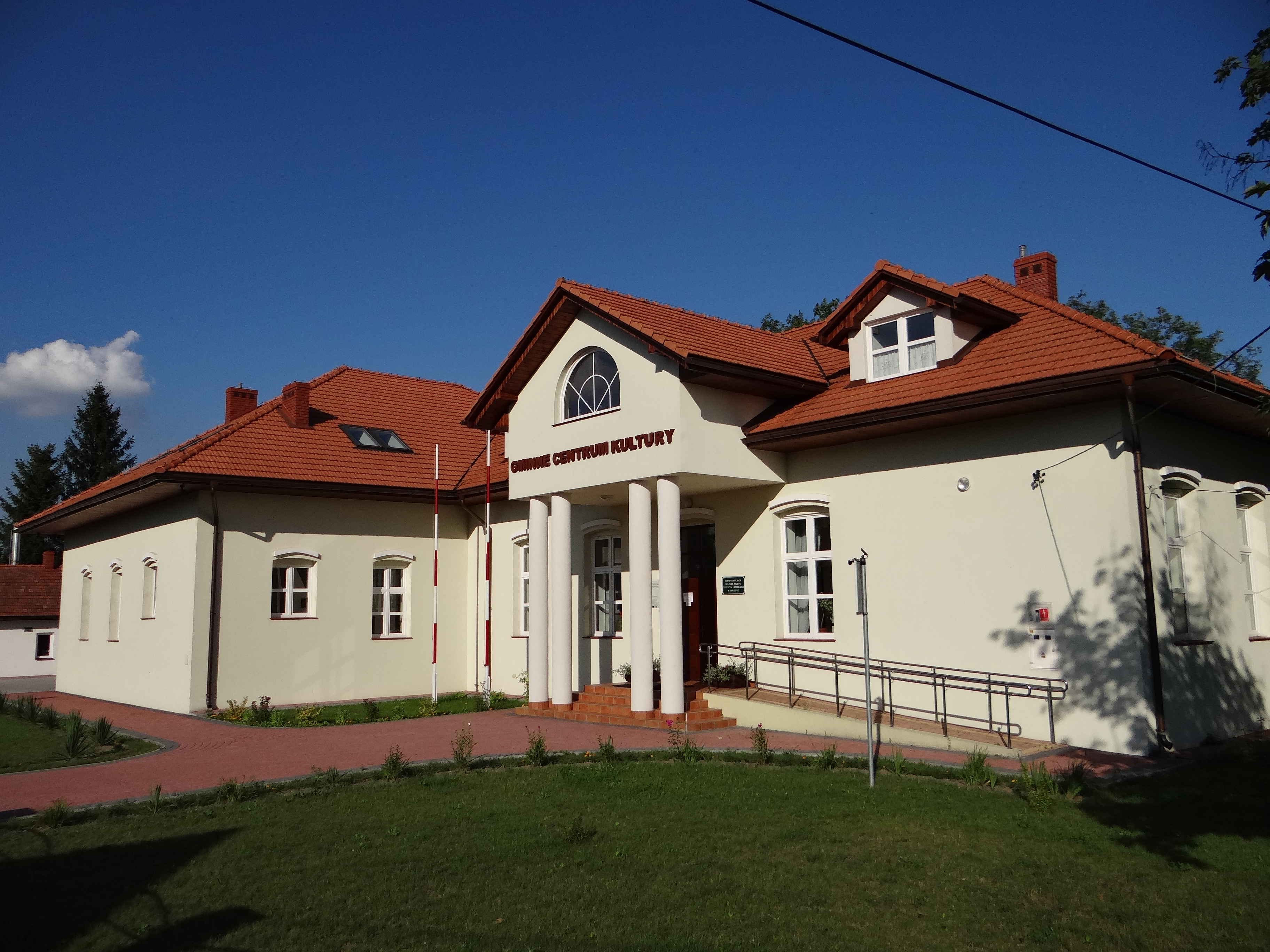 Budynek GOKSTiR w Jarocinie.